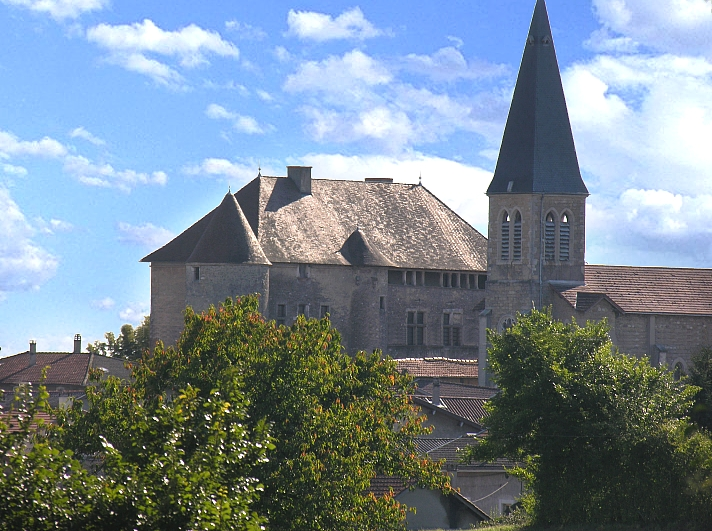 Photo de Sainte Julie